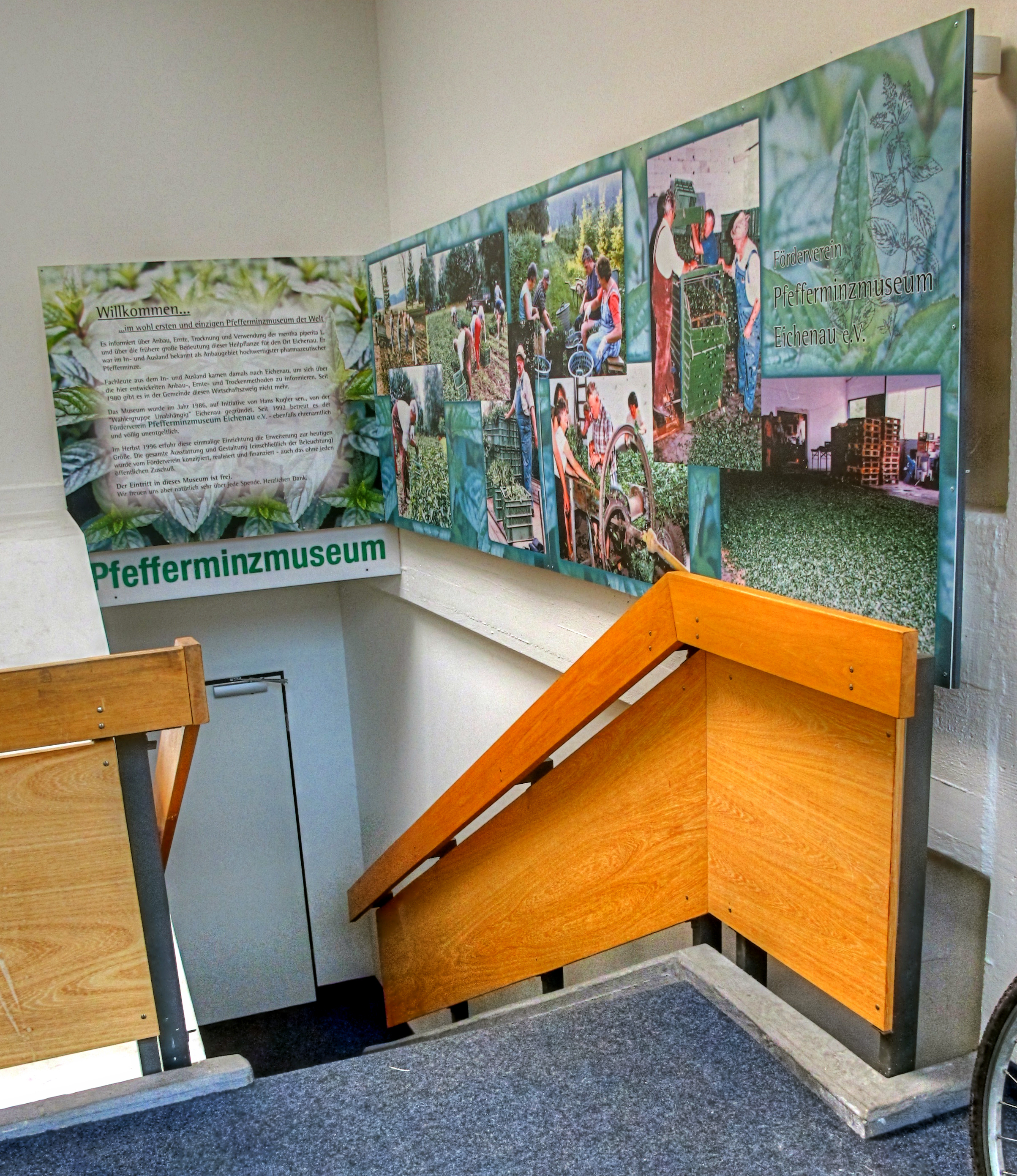 Deutschland, Bayern, Oberbayern, Landkreis Fürstenfeldbruck, Gemeinde Eichenau, Pfefferminzmuseum